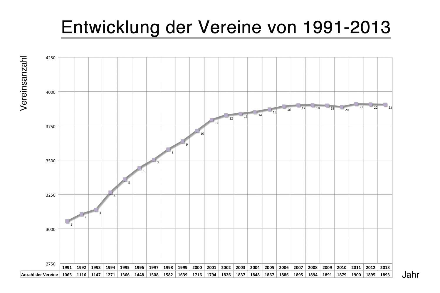 Vereinsentwicklung LSB M-V von 1991 - 2013 Quelle: Statistik 2013 des Landessportbundes Mecklenburg-Vorpommern e.V.